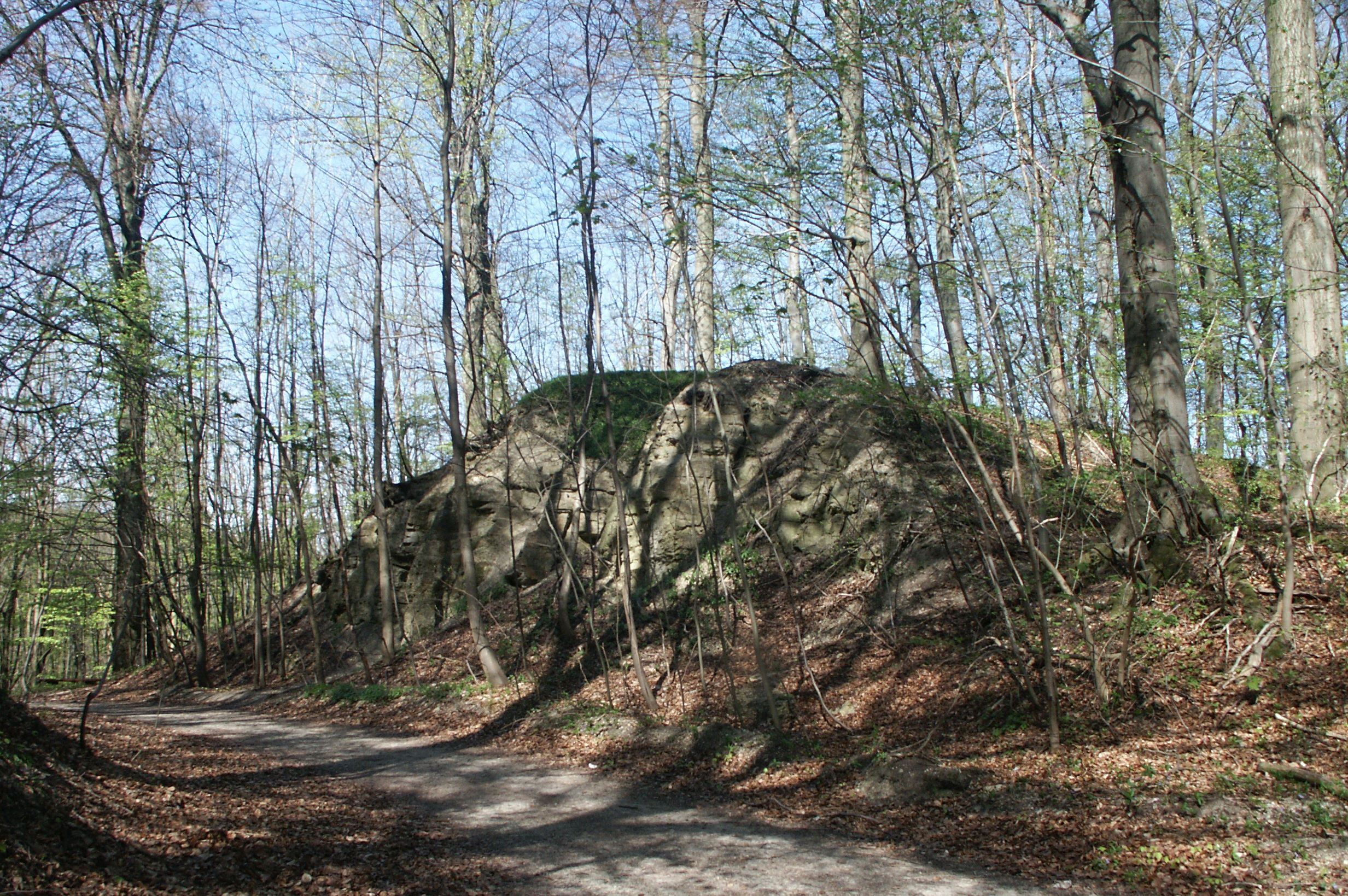 Ruine Dreienburg, Halsgraben (vermutlich heute breiter als bei der mittelaterlichen Anlage, da heute ein ausgebauter Forstweg durch den Graben führt)